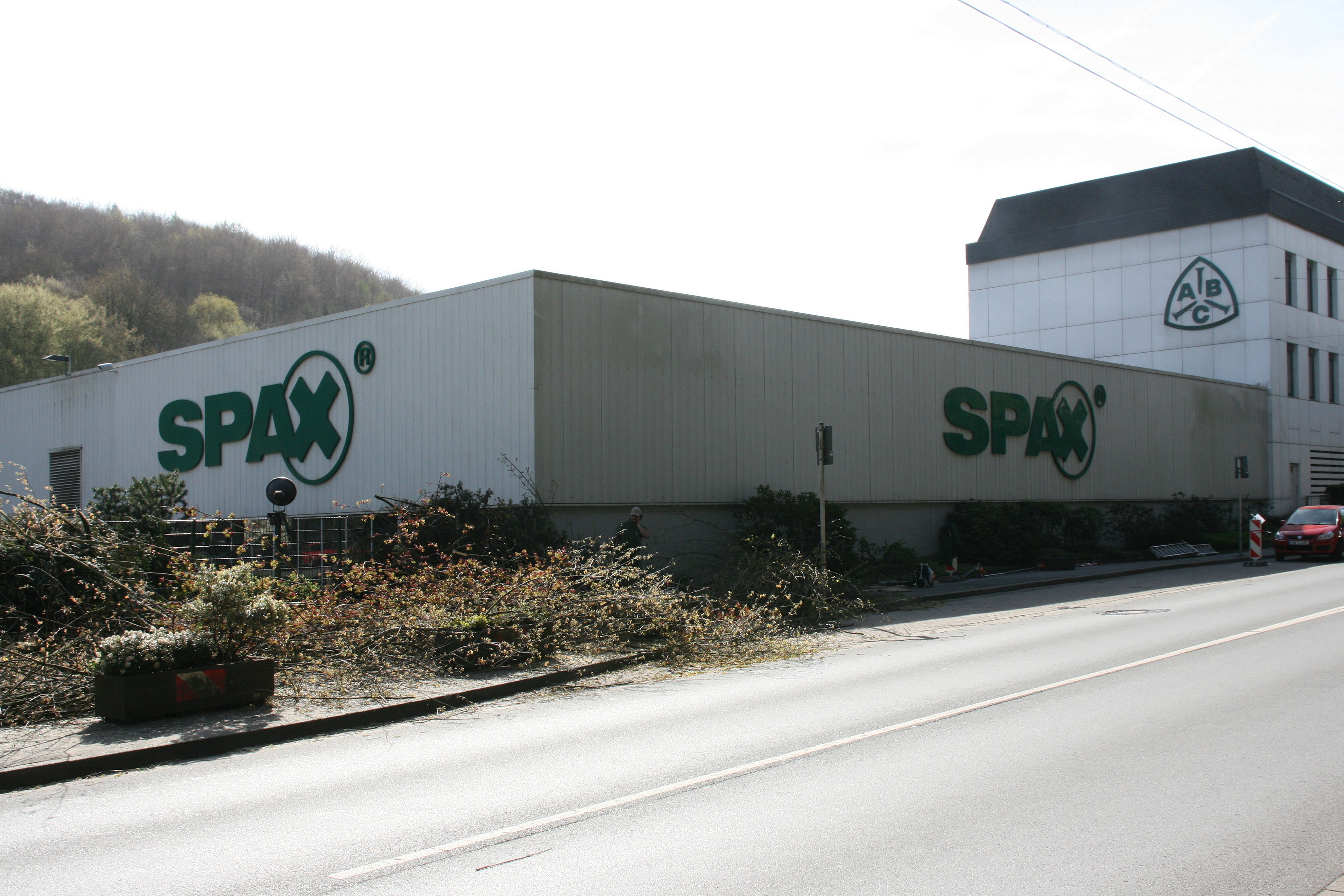 Altenloh, Brinck & Co, Kölner Straße 71-77 in Ennepetal